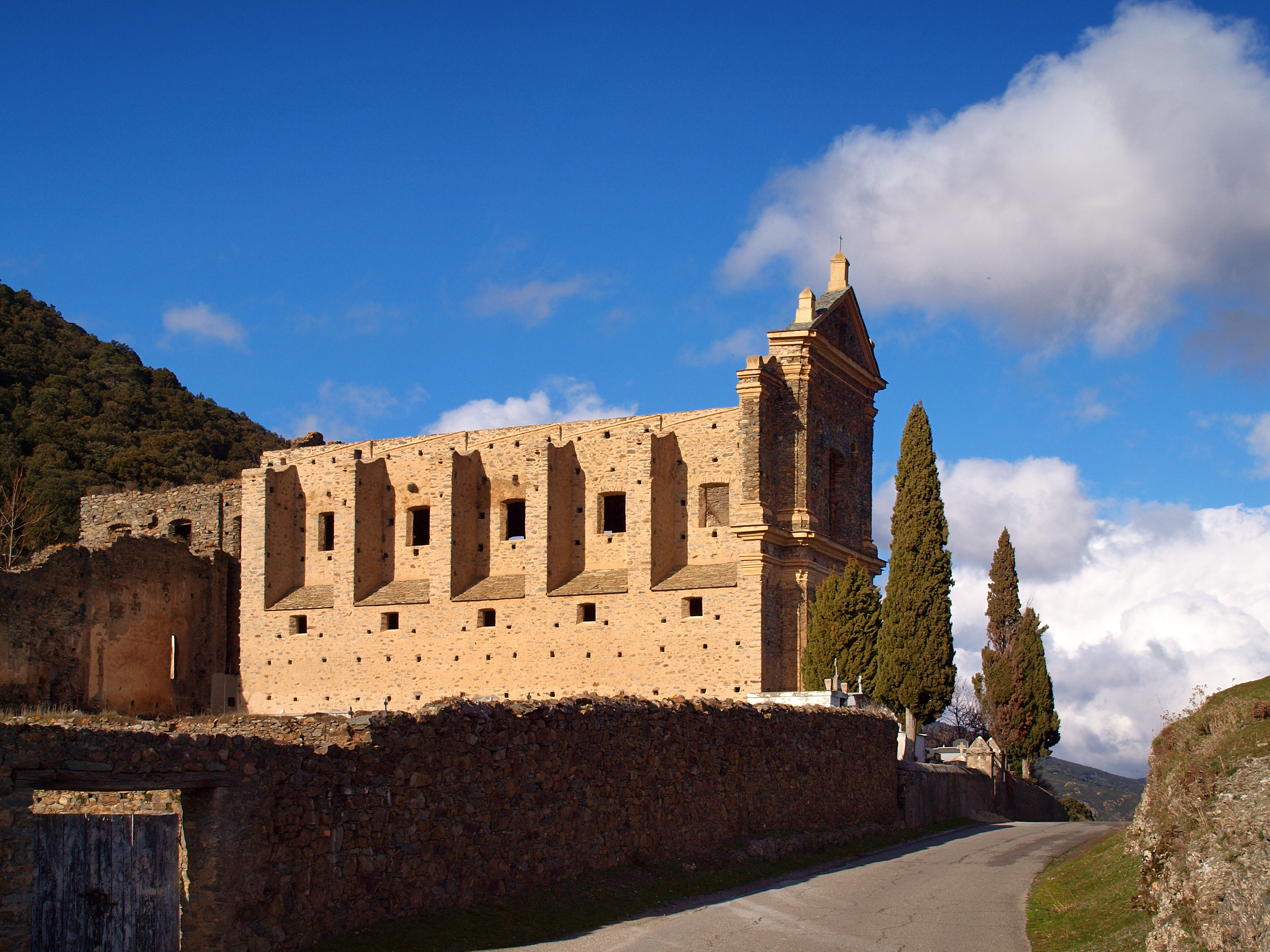 Castifao (Corse) - Couvent Saint-François de Caccia ruiné